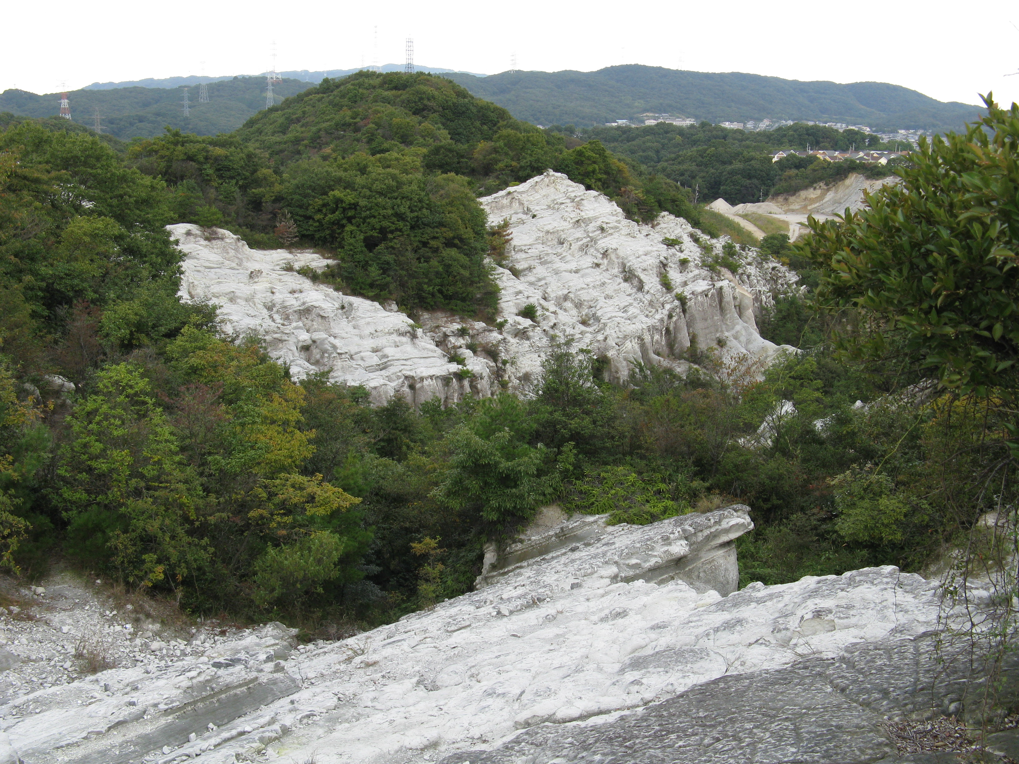 屯鶴峯